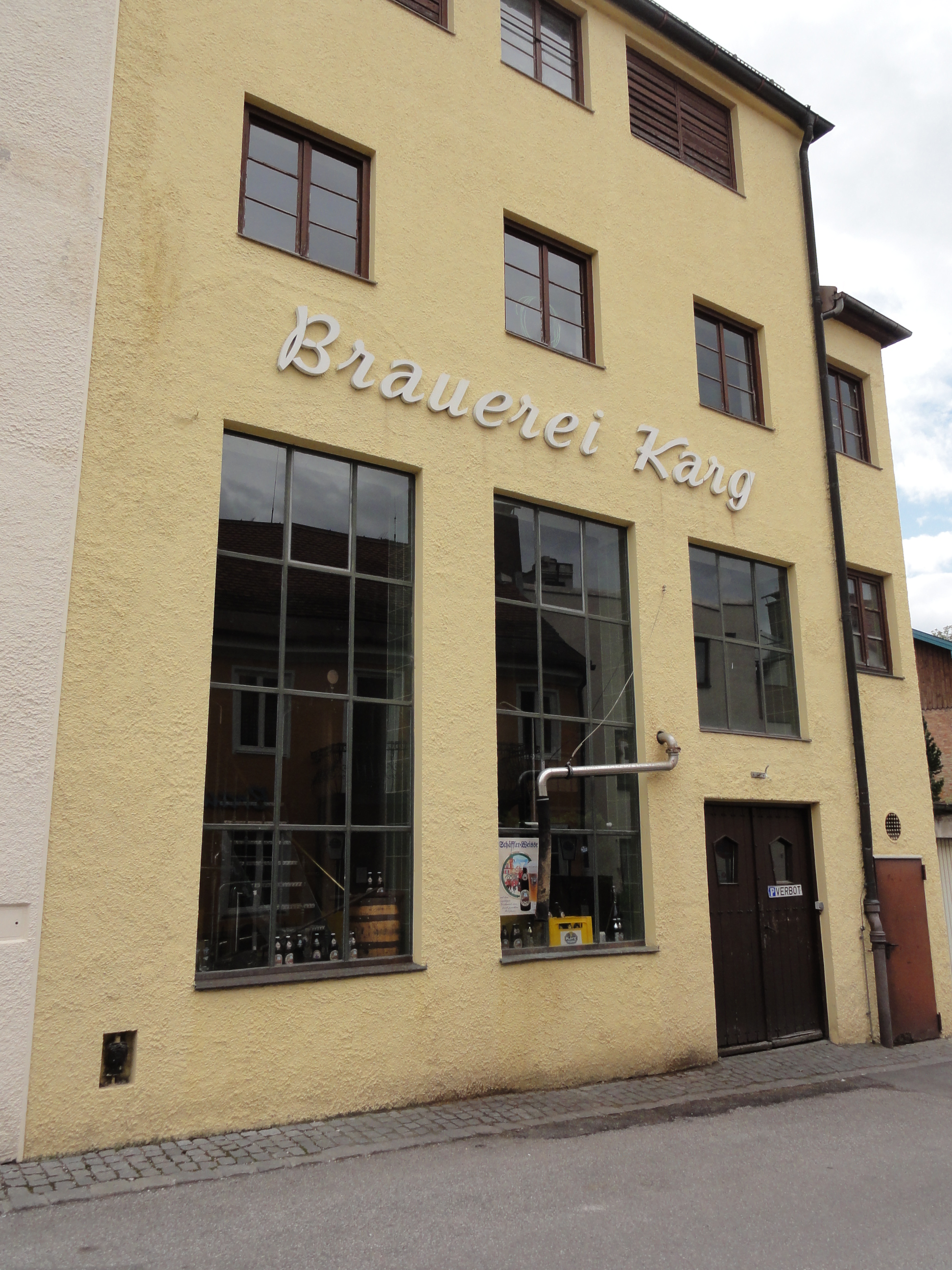 Murnau am Staffelsee, Germany